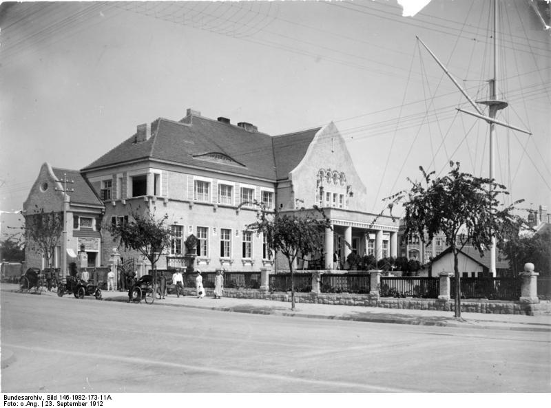 China, Tsingtau-Club gesehen von Ecke Friedrichstr. und Kaiser Wilhelm Ufer. Aufnahme vom 23. Sept. 1912 AIII 3472/12